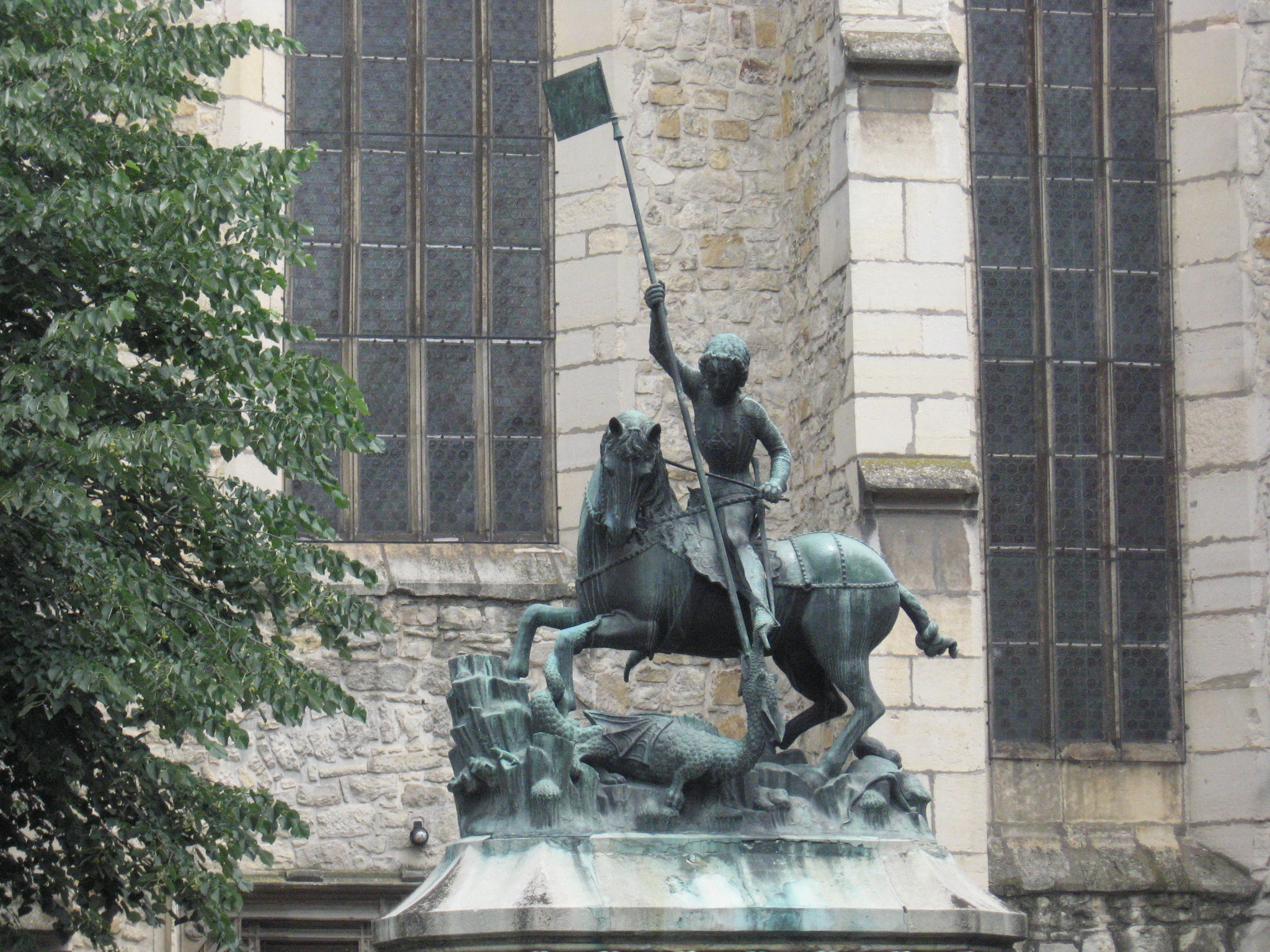 A kolozsvári Szent György-szoborRomână: Statuia lui Sfantu Gheorghe din Cluj